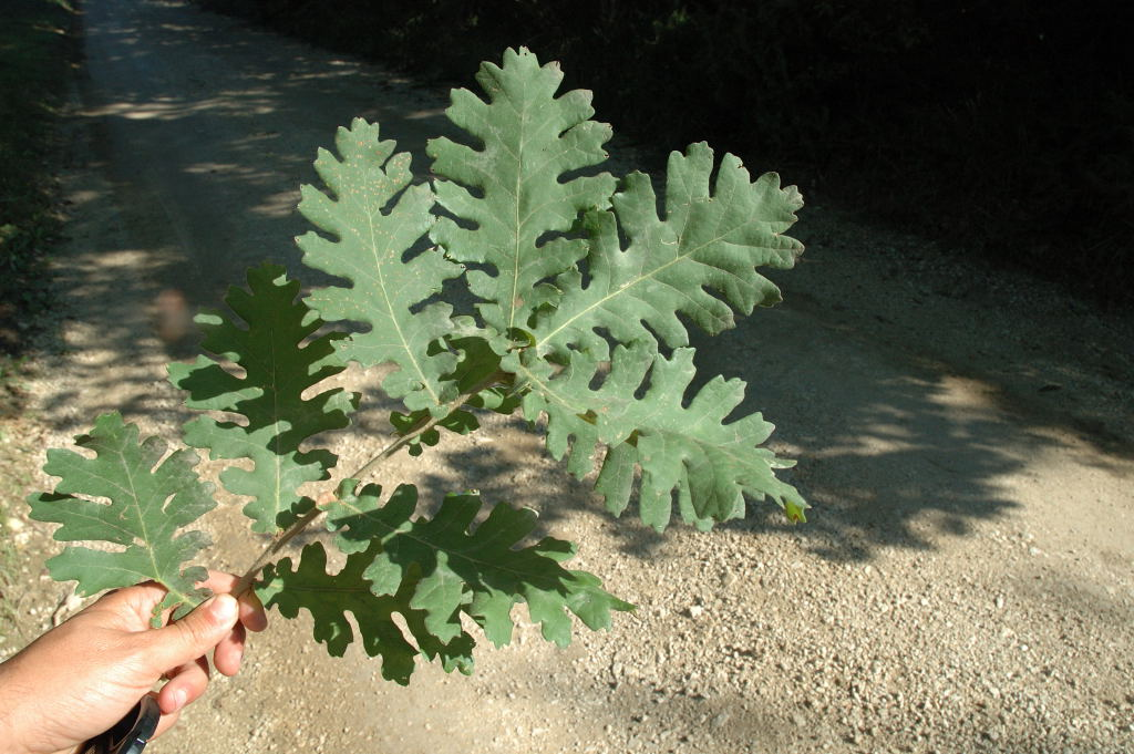 Foto del farnetto